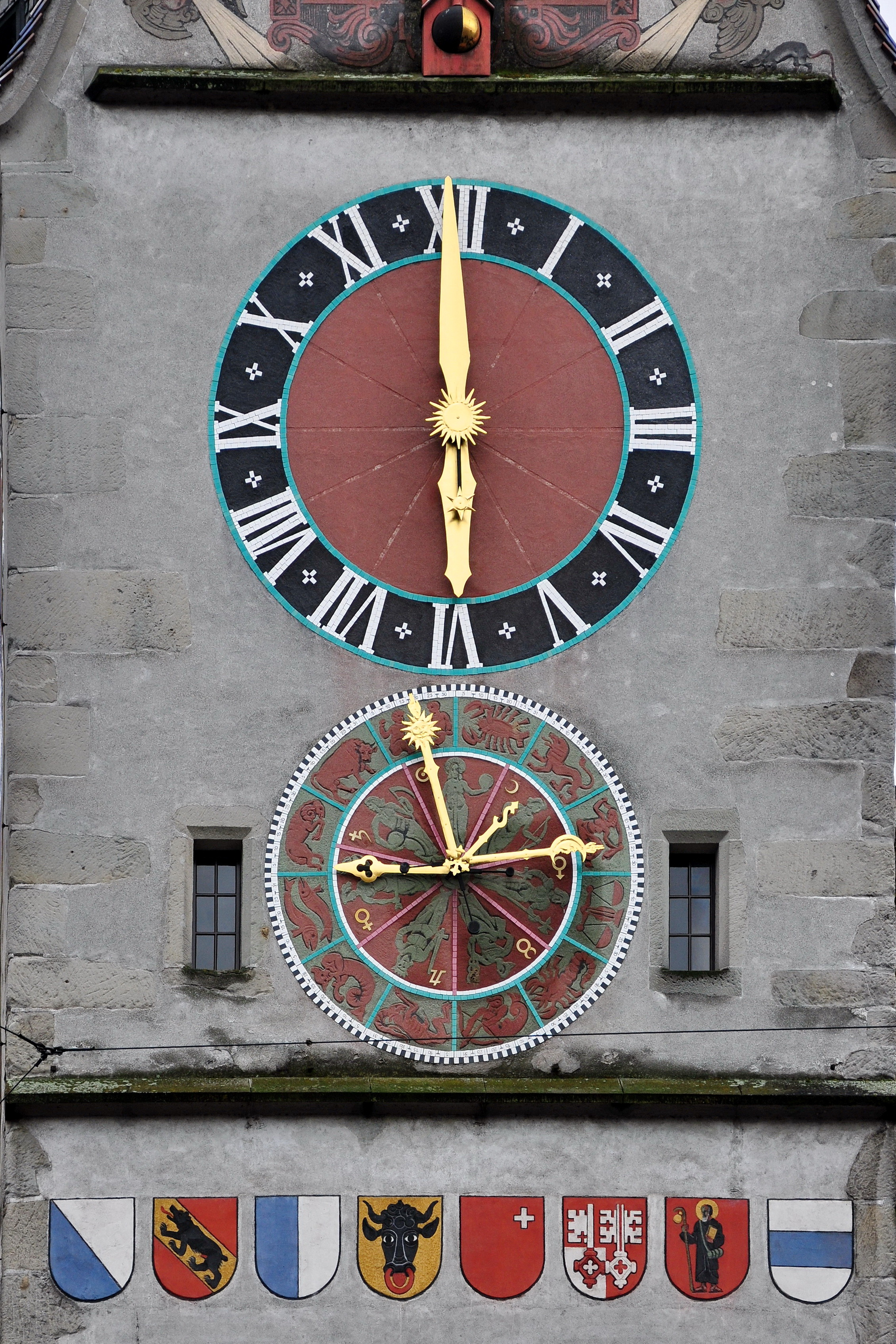 Zytturm in Zug (Switzerland)